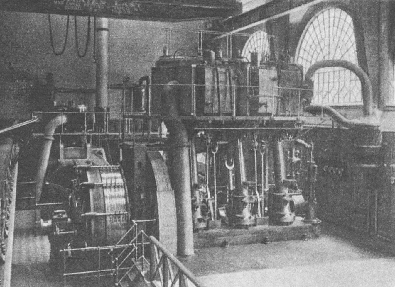 Brunkebergsverket ångmaskinen